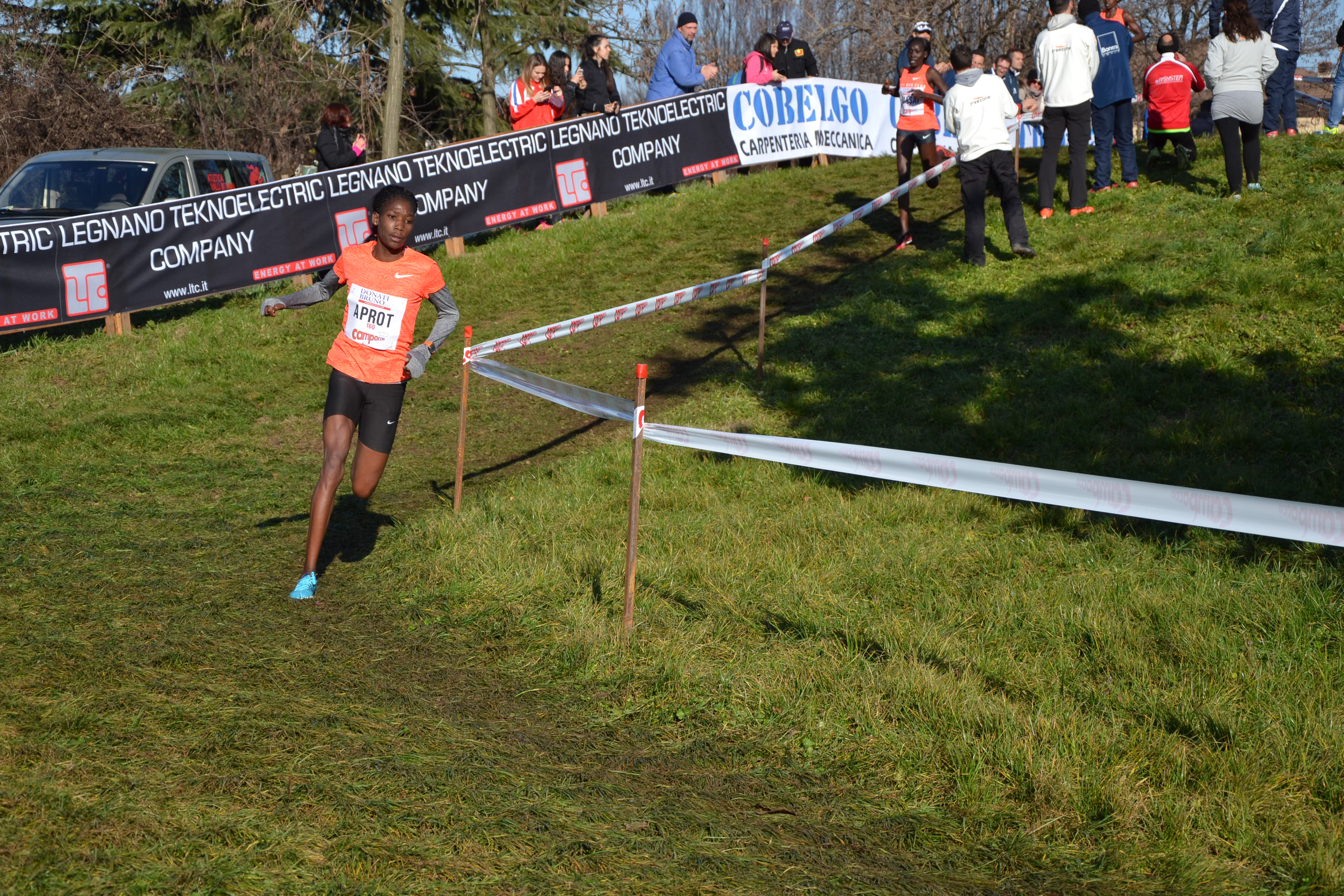 59º Cross del Campaccio. San Giorgio su Legnano, 6 gennaio 2016 Attribuzione: Lucia Moretti / A.S.D. Polisportiva Olonia / CC-BY-SA